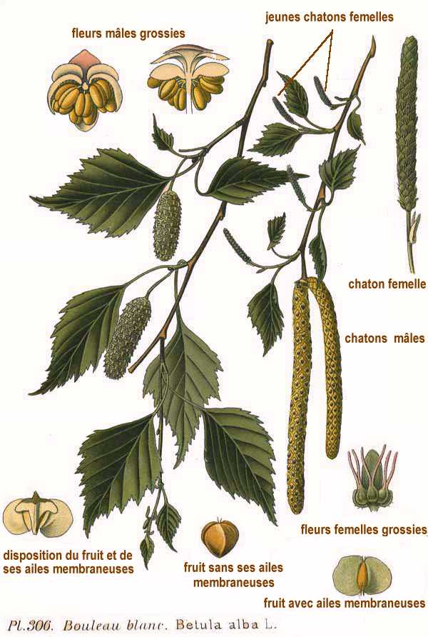 Betula pubescens Ehrh., syn. Betula alba L.